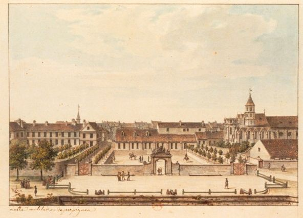 L'école militaire de Perpignan vers 1780